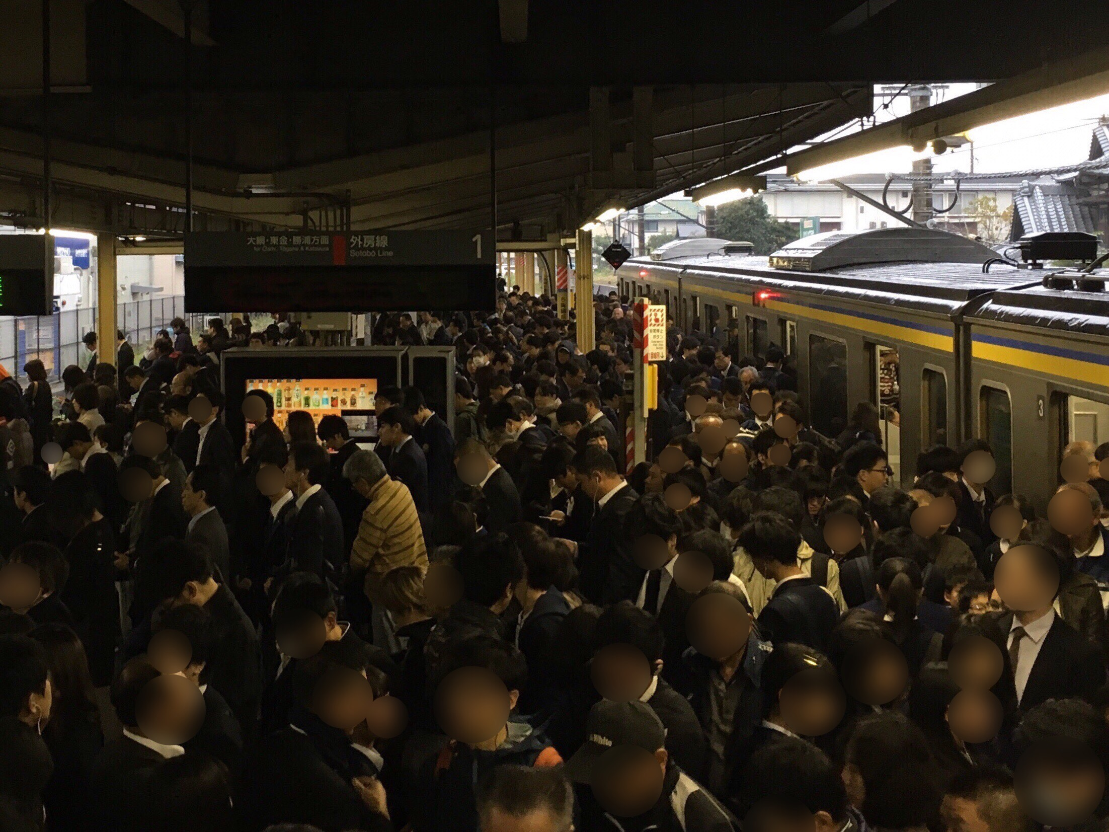 通勤時間帯の鎌取駅ホーム